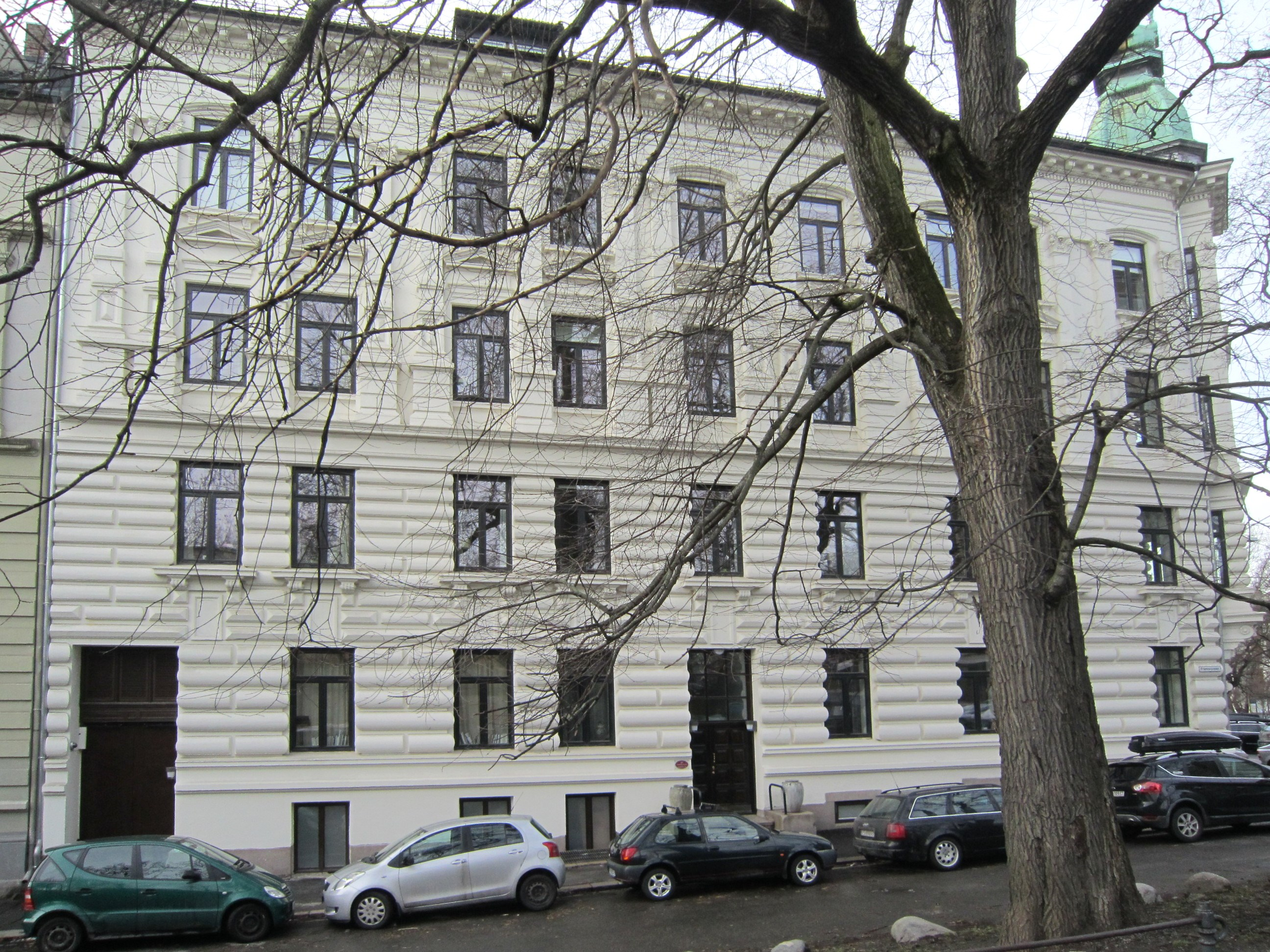 Framnesveien 14-16 (ark. Carl Aaman) på Skillebekk i Oslo